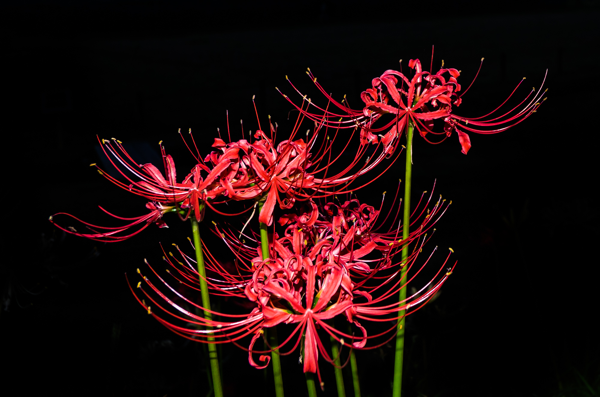 彼岸花（曼珠沙華）- 埼玉県日高市「巾着田」